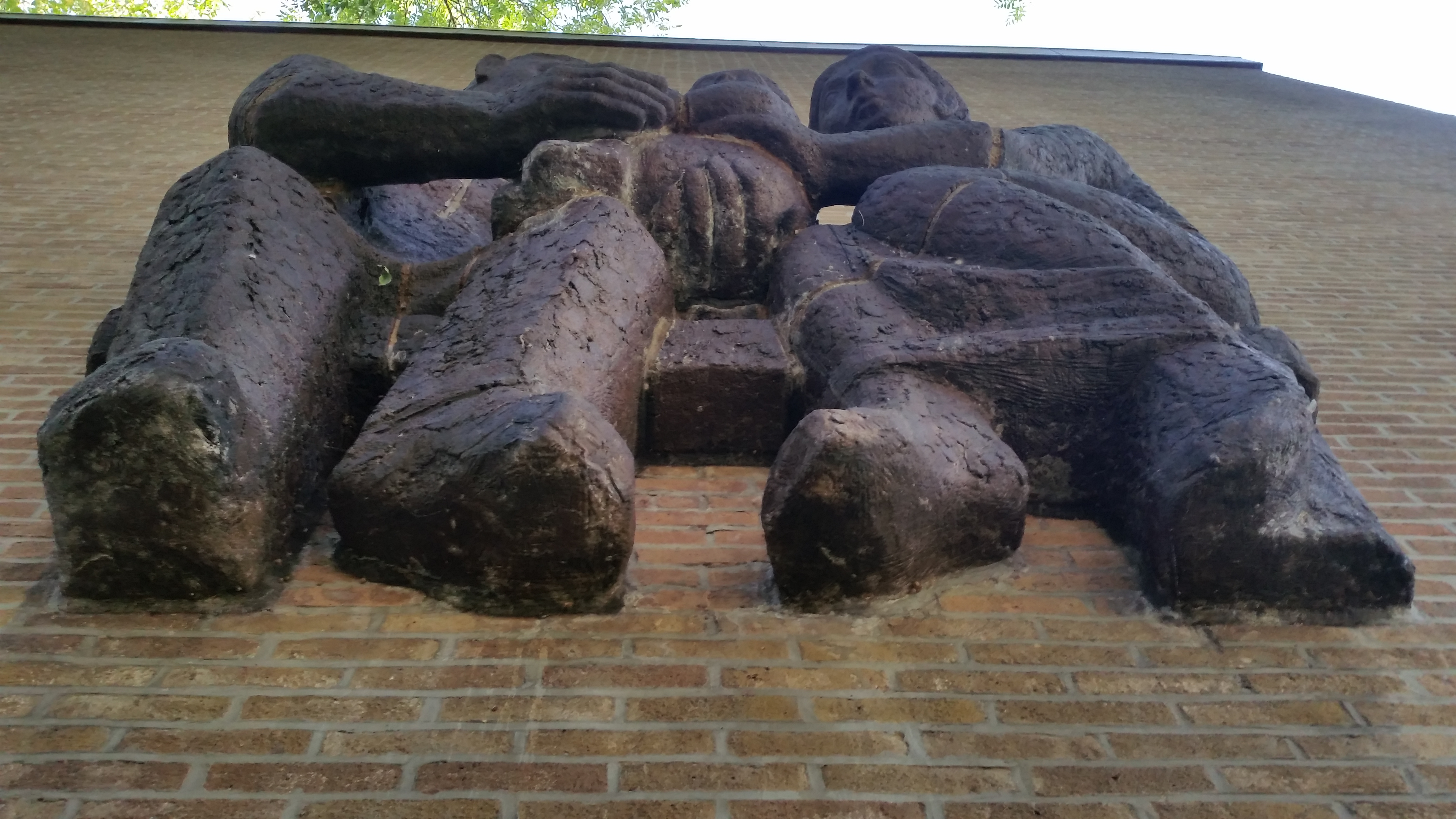 Gevelreliëf Het Gezin, Du Perronstraat/Burg. van Leeuwenlaan, Amsterdam-West. Nico Onkenhout, 1955. Chamotte; van onder gezien